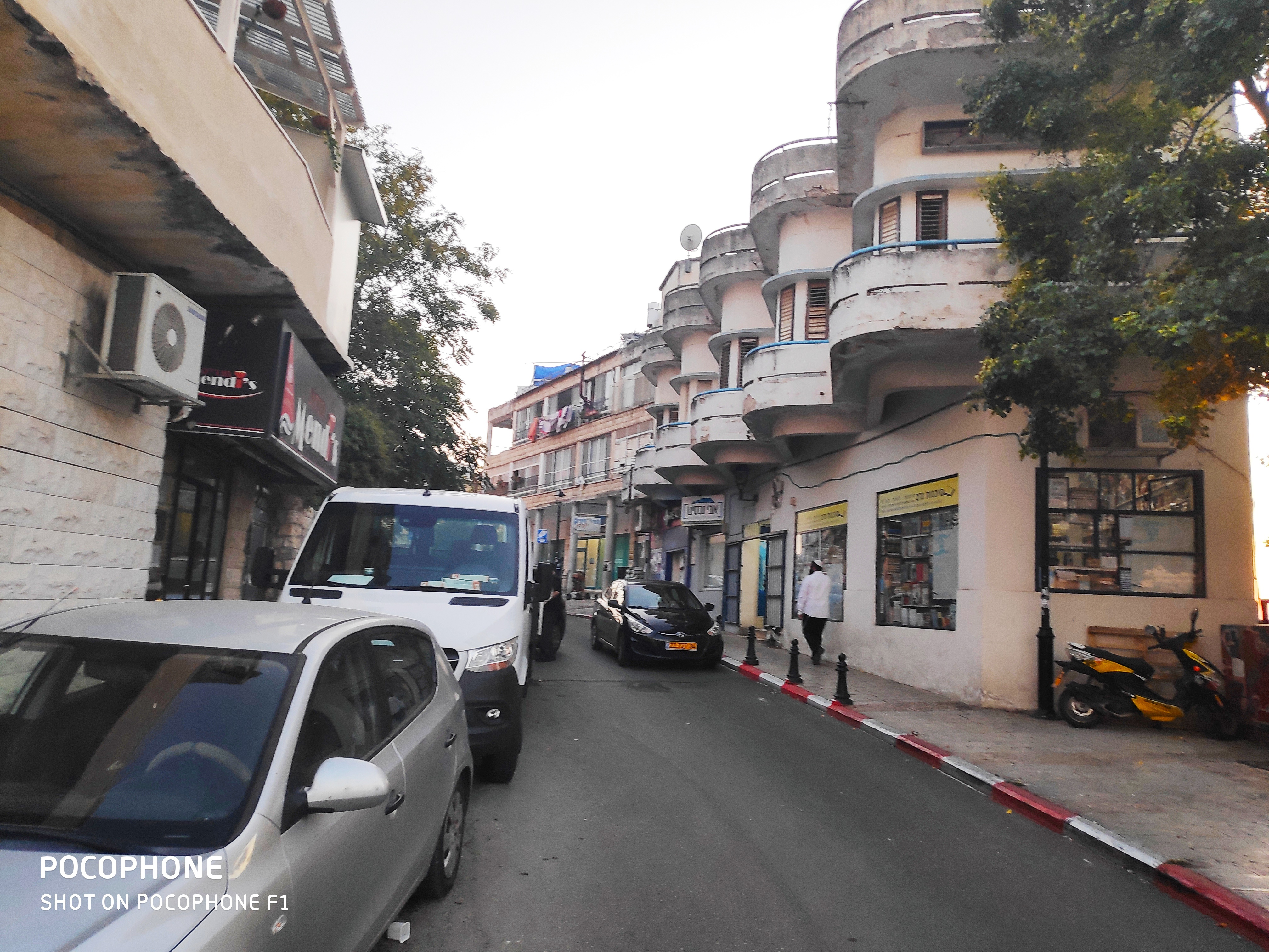 הבניין ששימש בעבר את מלון הרצליה, צפת 2019